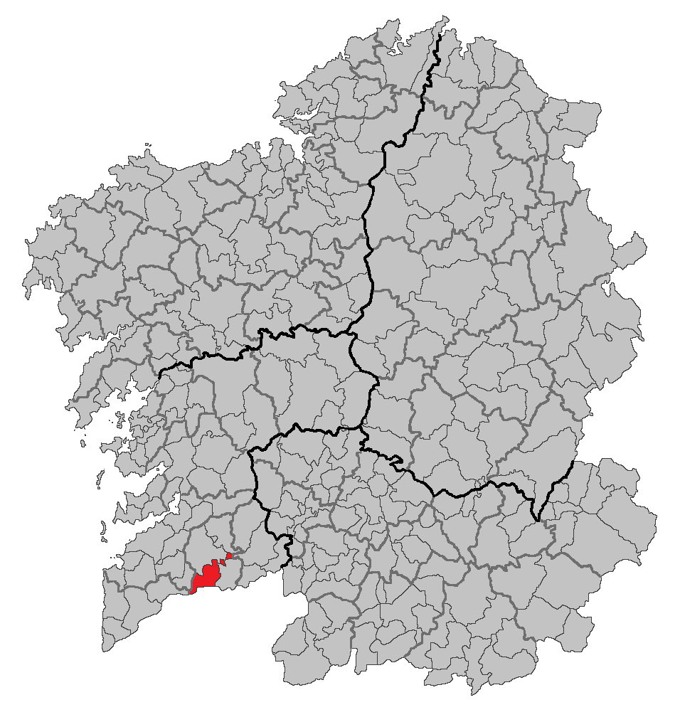 Mapa coa localización do concello de Salvaterra de Miño.